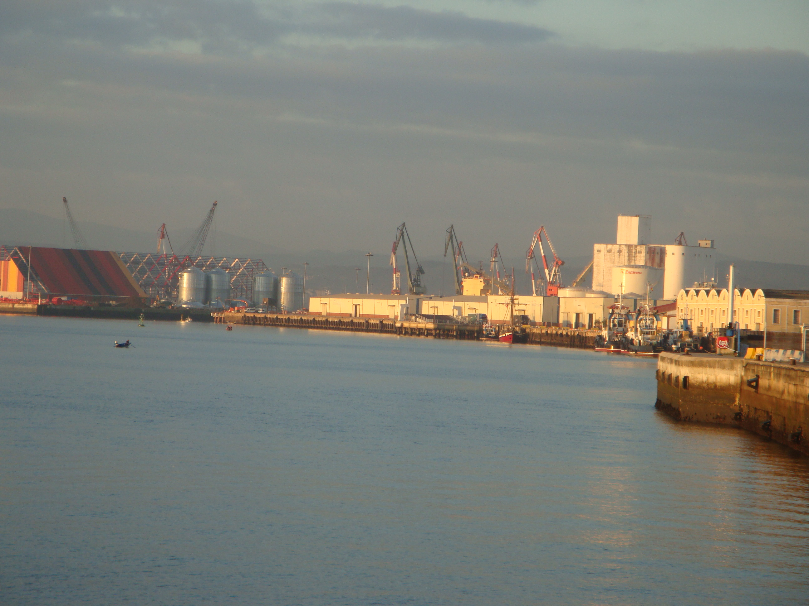 Vista general de Puerto de Santander